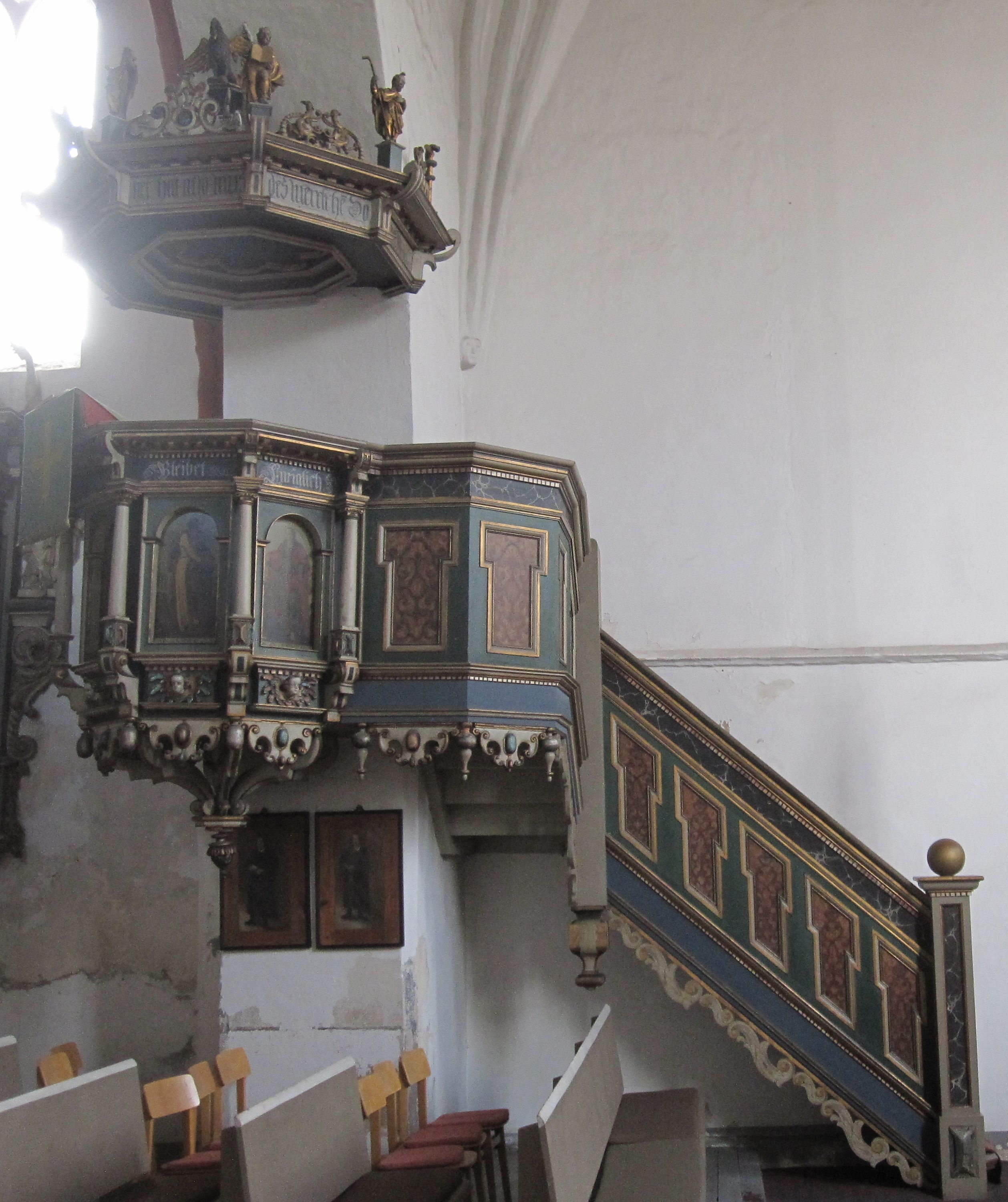 Renaissance-Kanzel aus dem Jahr 1622. Auf dem Schalldeckel ein Pelikan, "Symbol der Liebe Gottes zu den Menschen wie des leidenden Christus" (Ulrich Pfeil, Führer St. Nikolai-Kirche, Passau 1993).